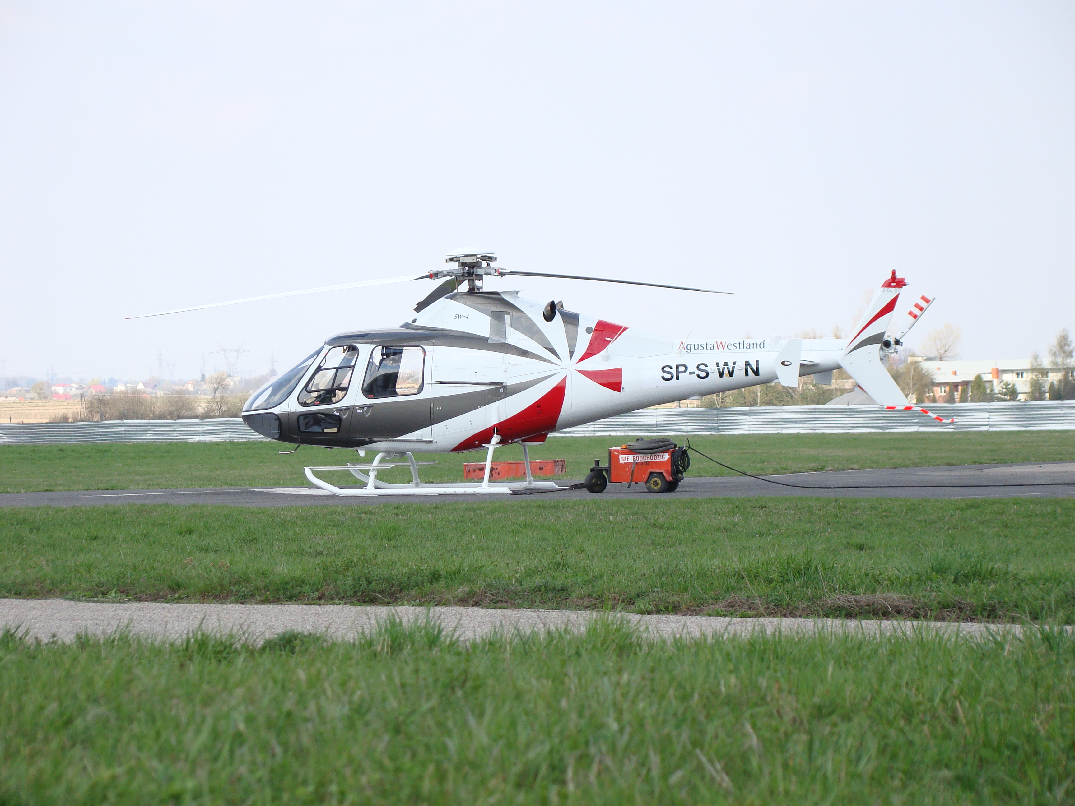 PZL SW-4 w malowaniu promocyjnym AgustyWestland